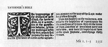 Taverner's Bible